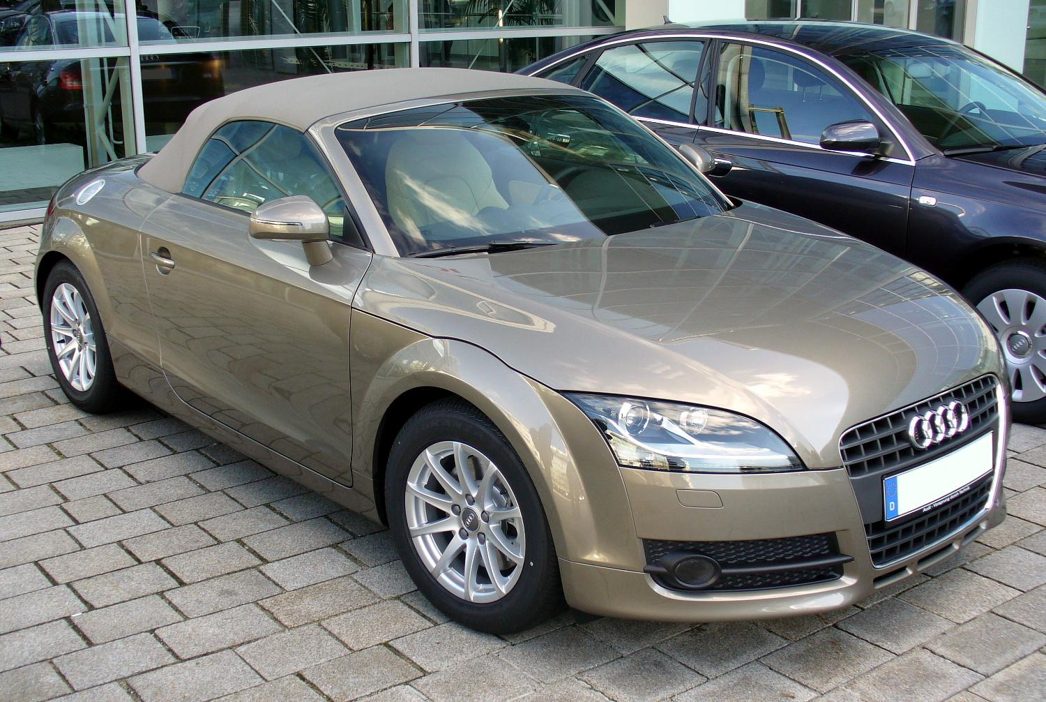 Audi TT Roadster